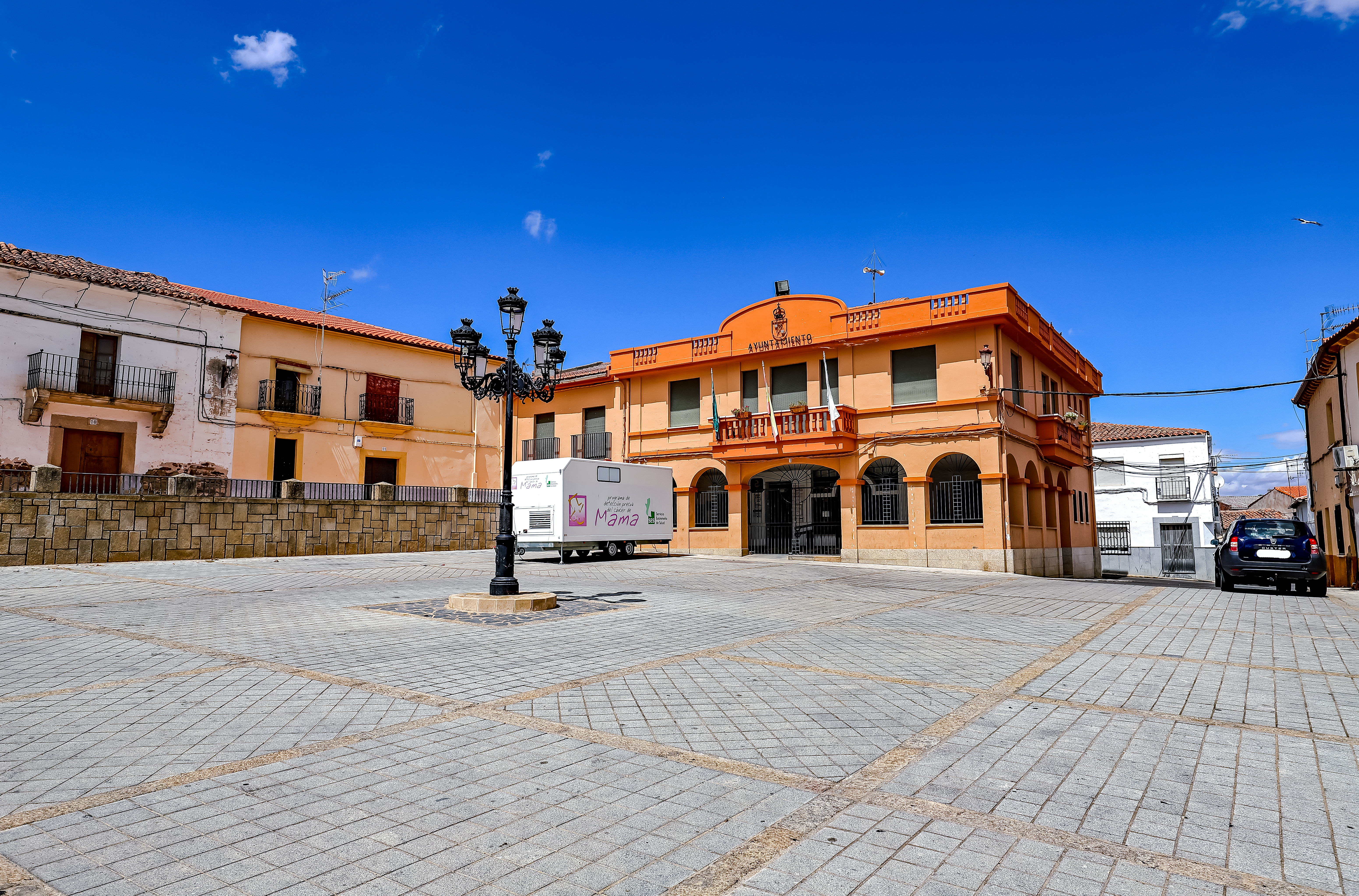 Casillas de Coria es un municipio de la mancomunidad de Rivera de Fresnedosa en la provincia de Cáceres.